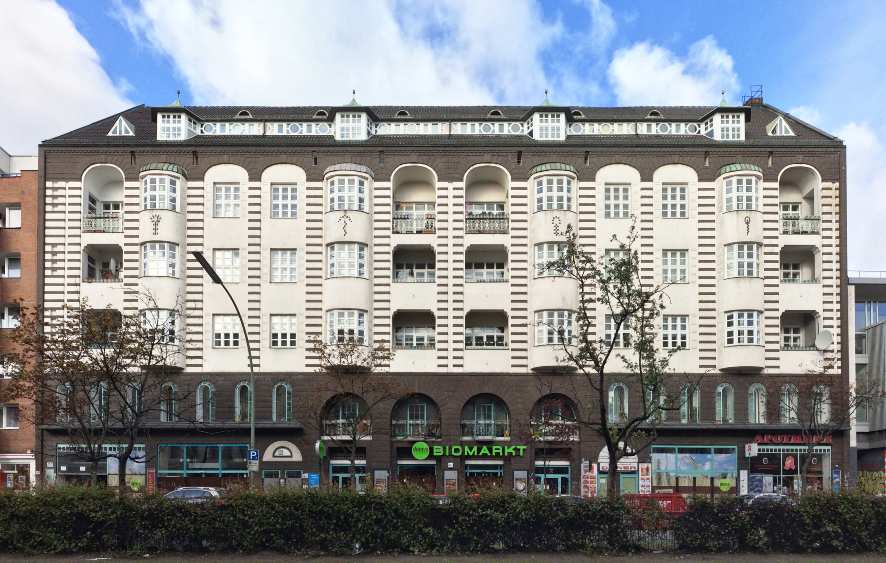 Wohn- und Geschäftshaus, 1910–1911, Bruno Taut und Arthur Vogdt, Umbau 1977–1982, Hinrich Baller und Inken Baller